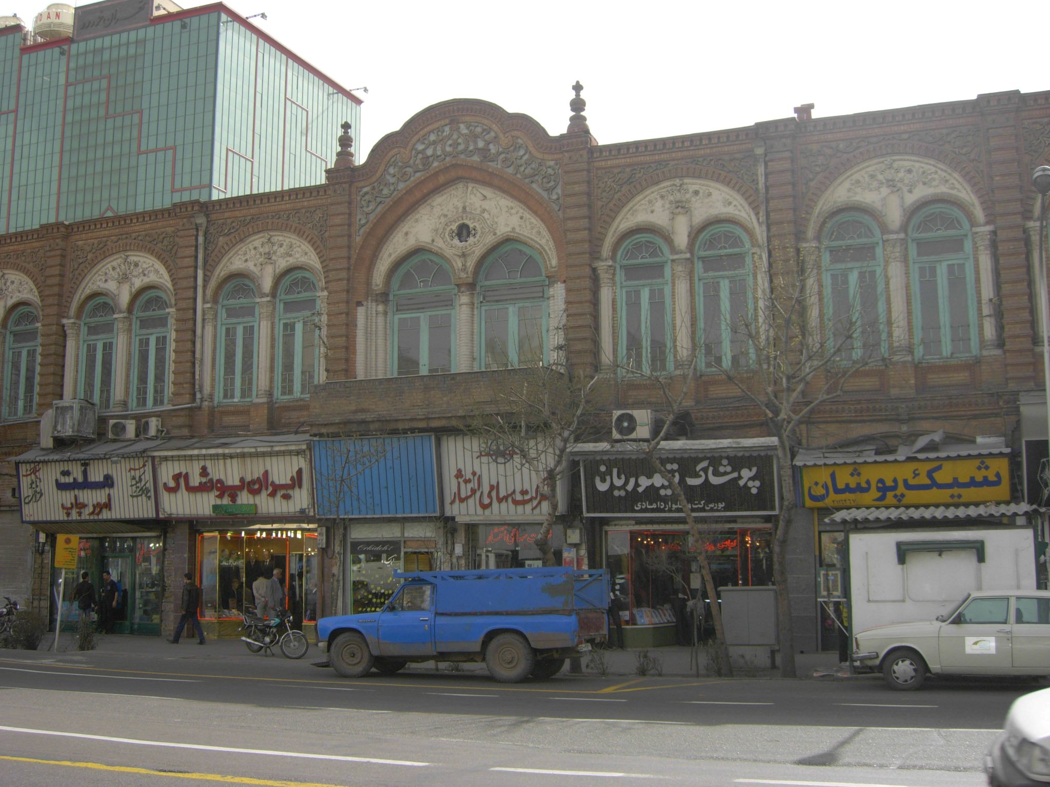 دفتر مرکزی شرکت سهامی انتشار در میدان بهارستان، خیابان جمهوری